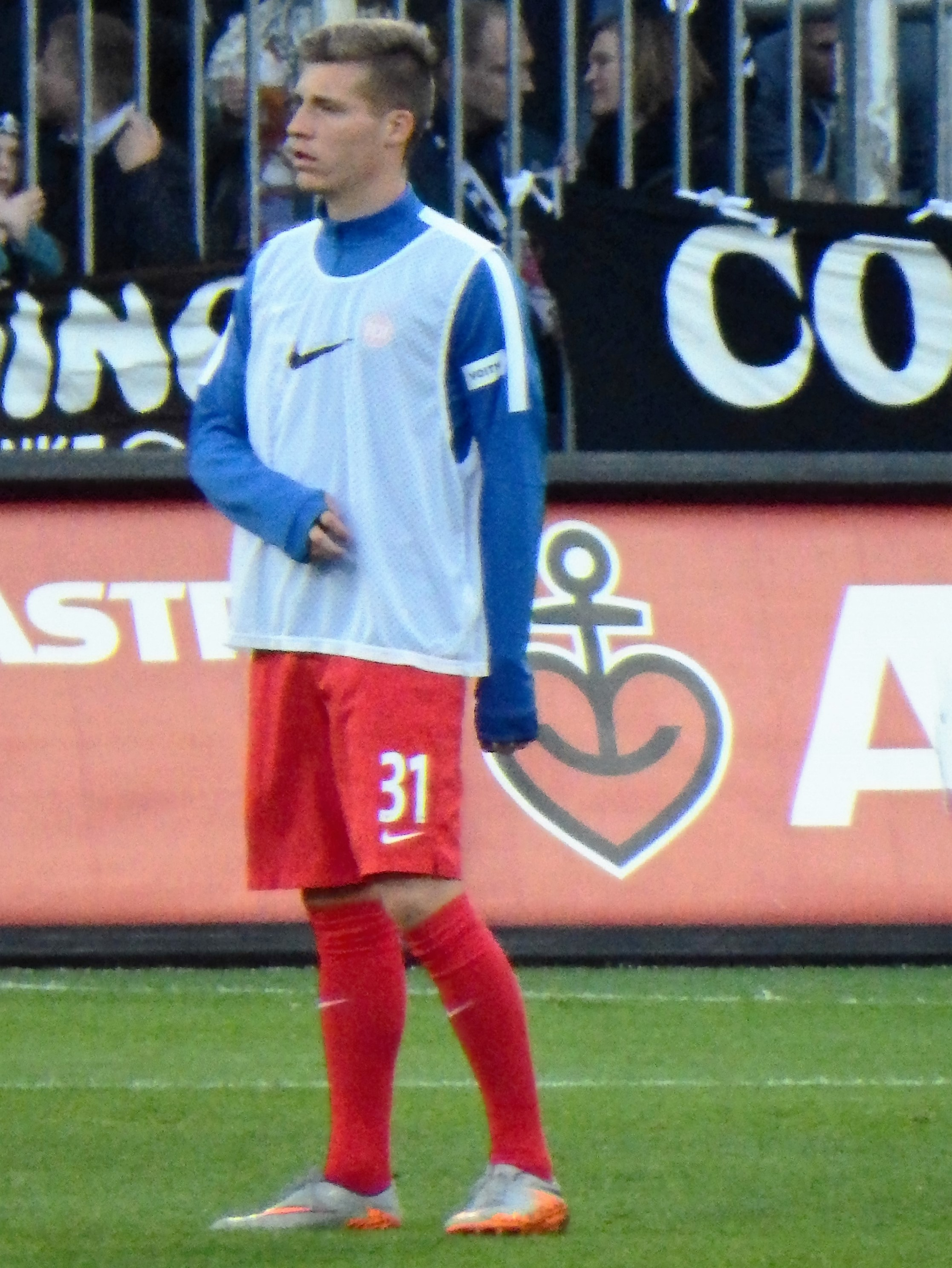 Widemann, Dominik Heidenheim